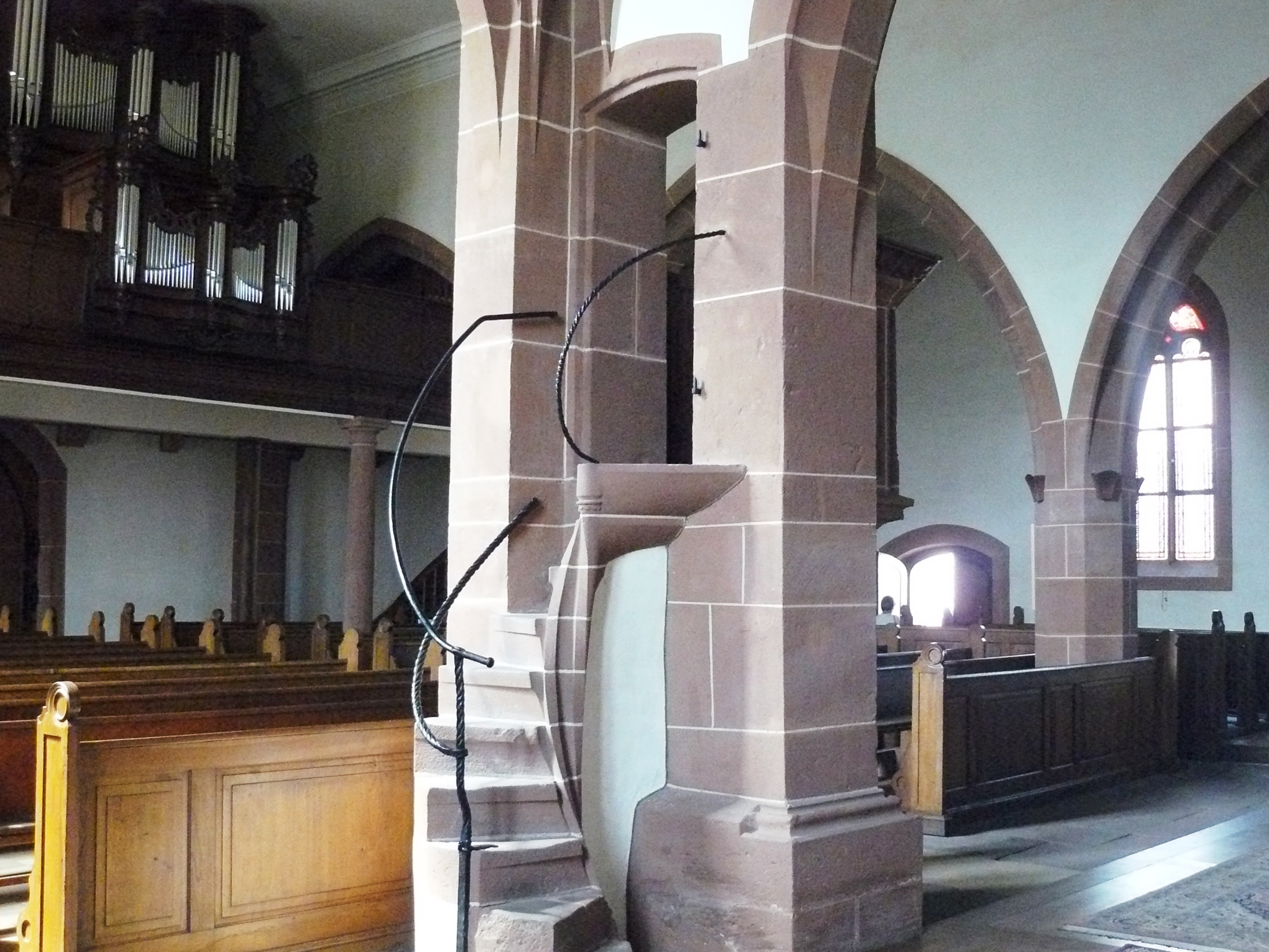 La chaire de l'église d'Hunawihr et son pilier avec lequel elle fait corps